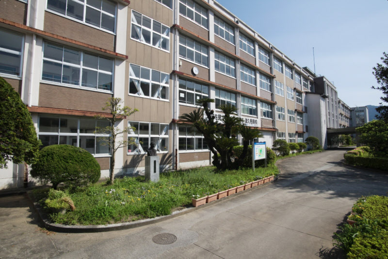 公舎生徒棟